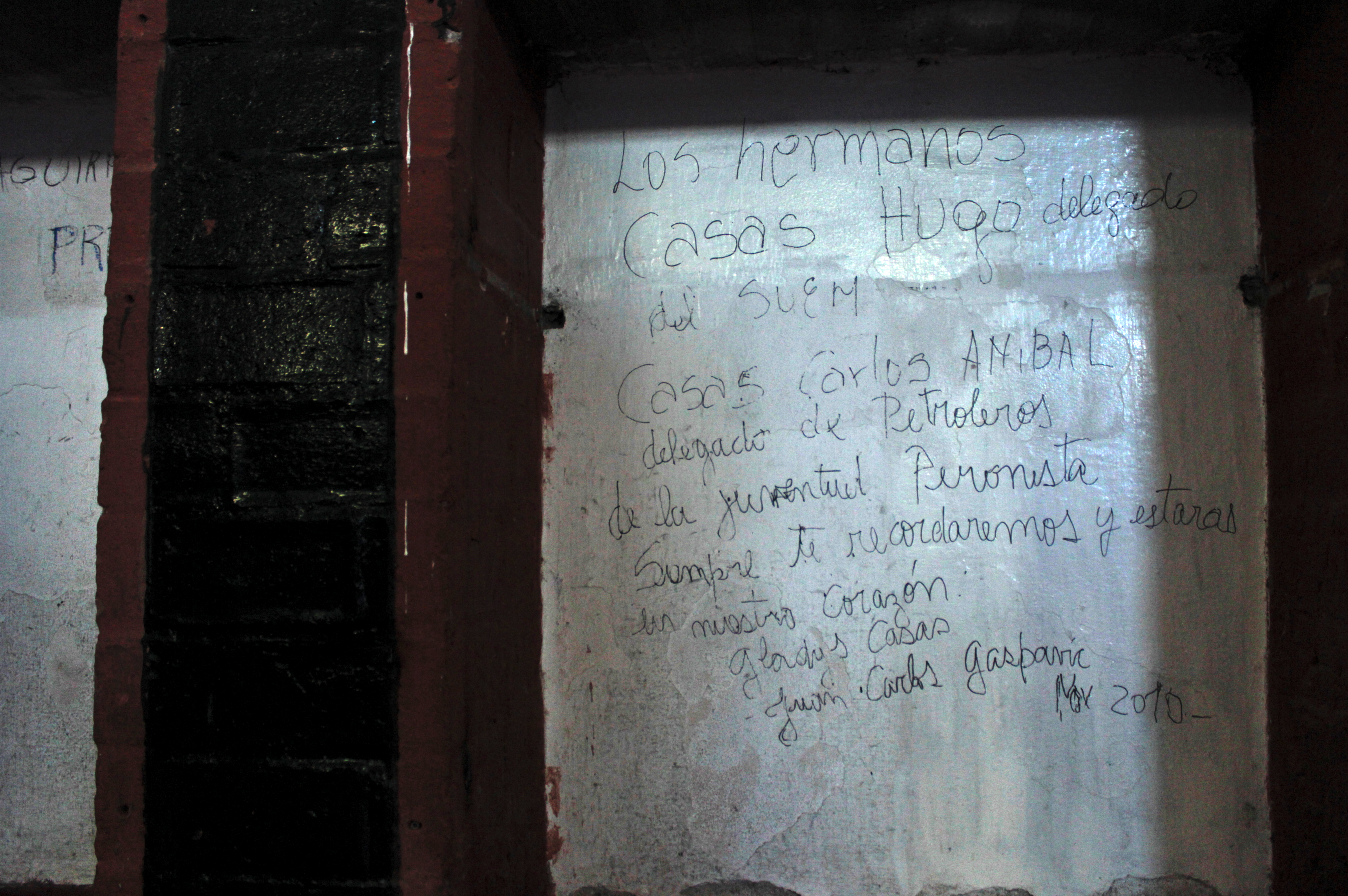 Mensajes recordatorios en el Espacio Para La Memoria La Perla